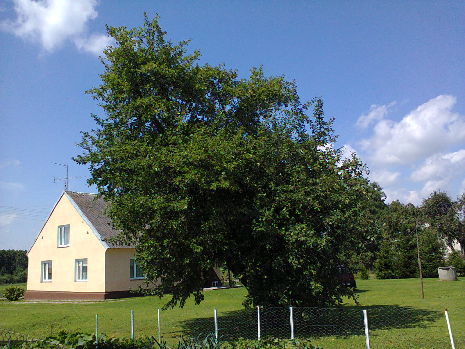 Jabłoń w Zabielu - pomnik przyrody